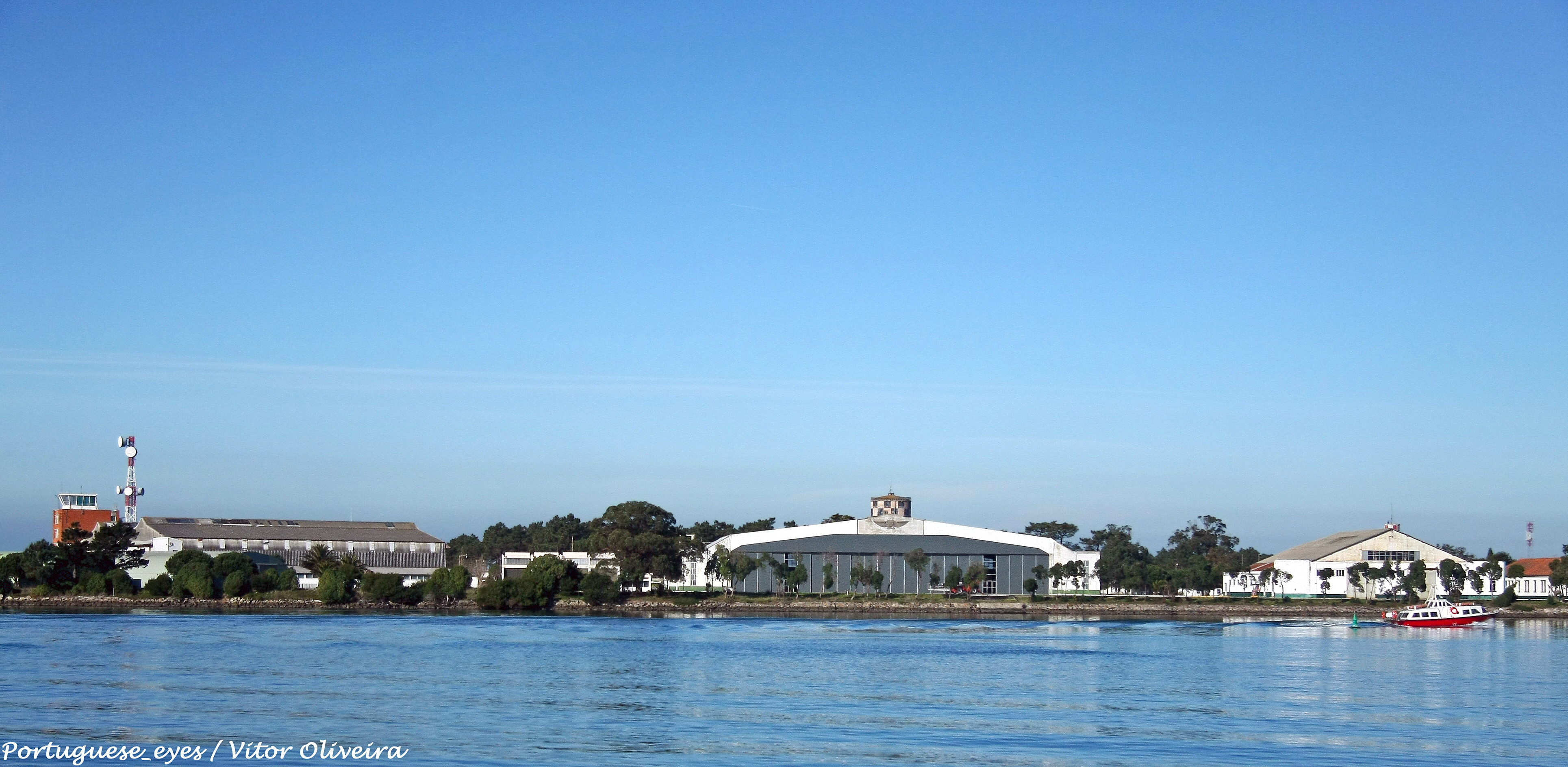 Base Aérea de São Jacinto - Portugal 🇵🇹